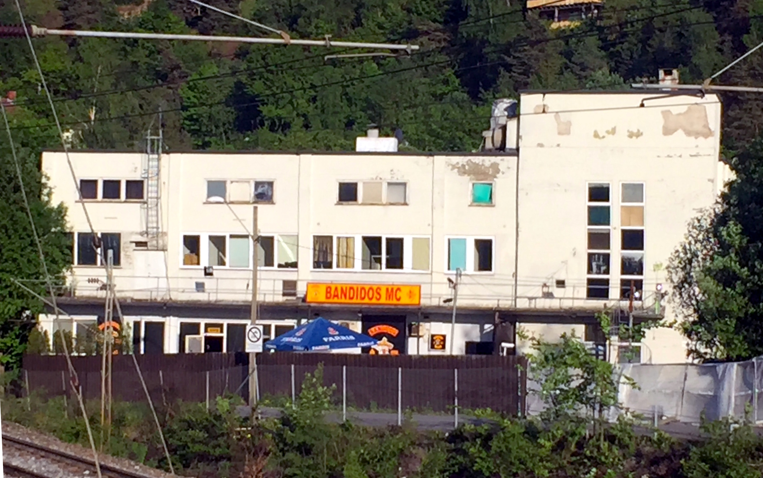 Bandidos-hovedkvarteret i Arnljot Gellines vei 35 i Oslo.